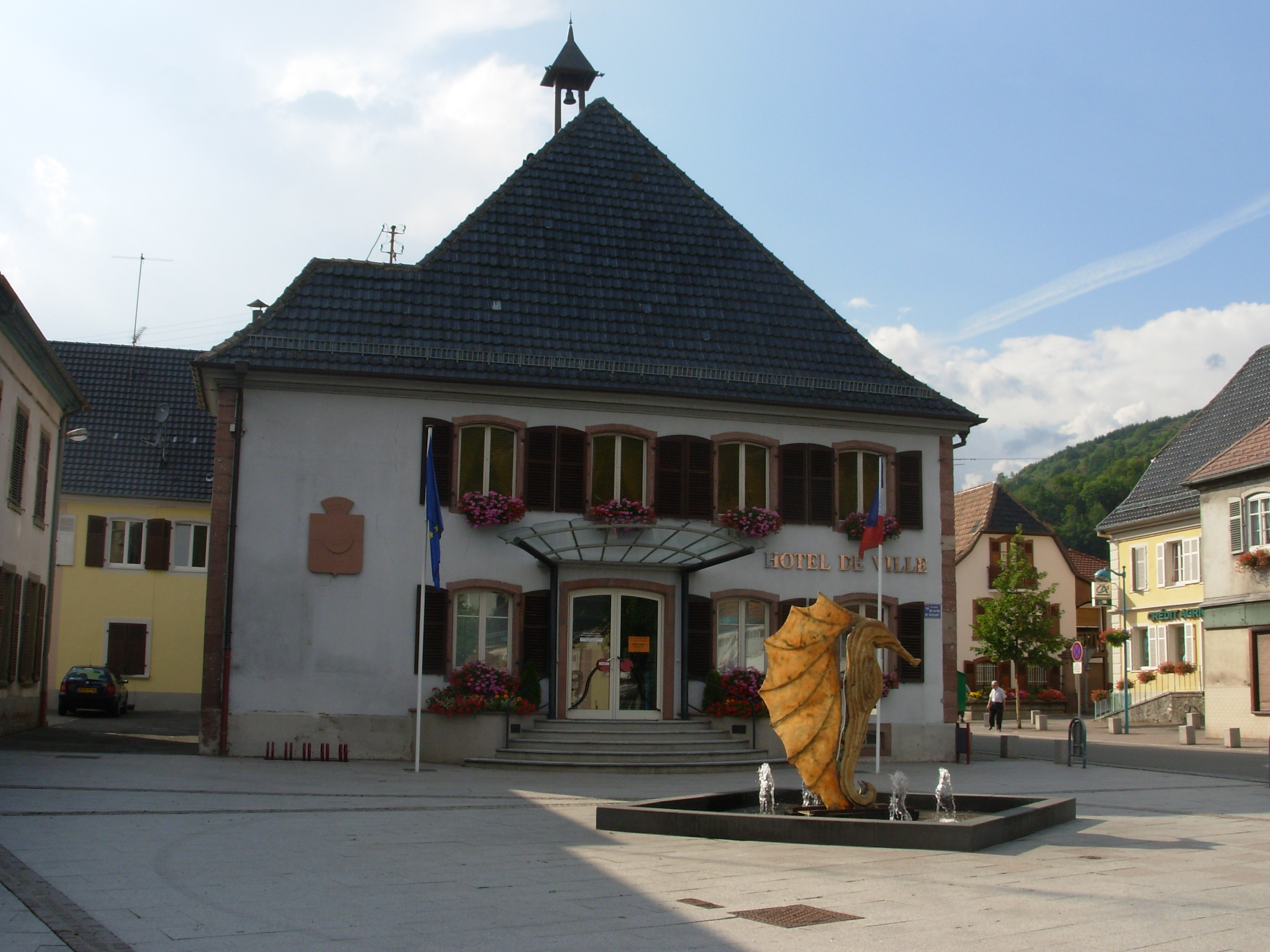 Hôtel de ville de Saint-Amarin, Alsace, France.